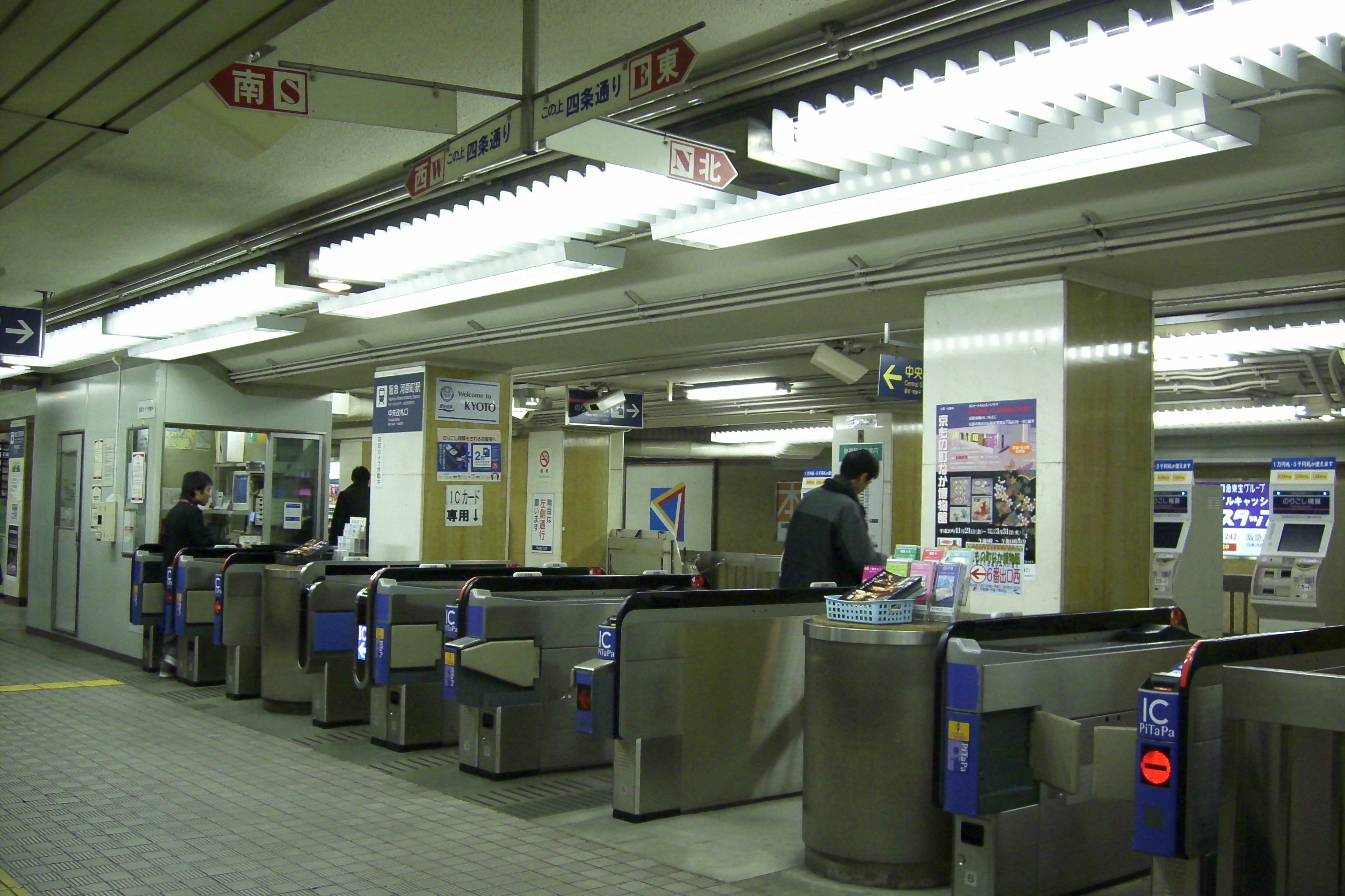 阪急電鉄河原町駅中央改札口